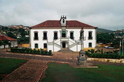 Mariana, Minas Gerais, Brasil